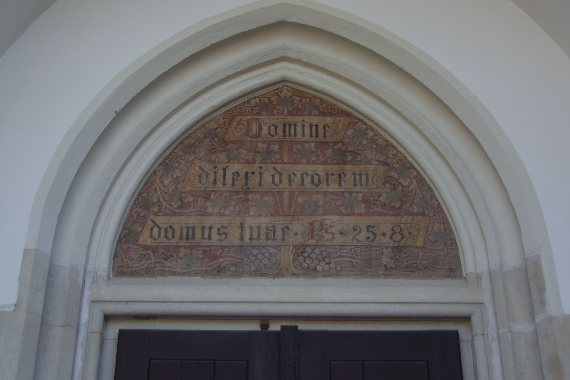 Kath. Pfarrkirche hl. Andreas